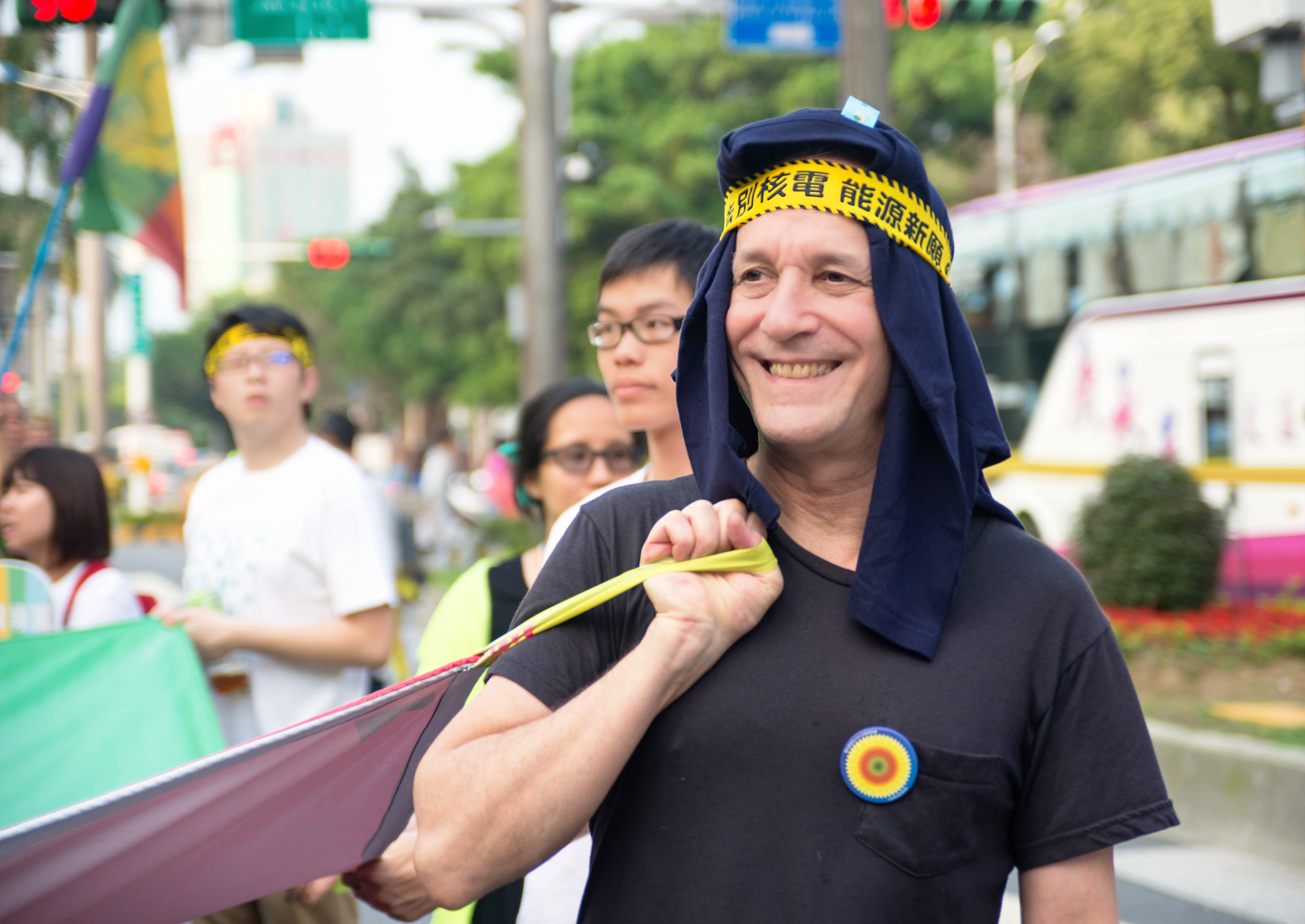 前臺灣綠黨召集人文魯彬參加2015年廢核大遊行。